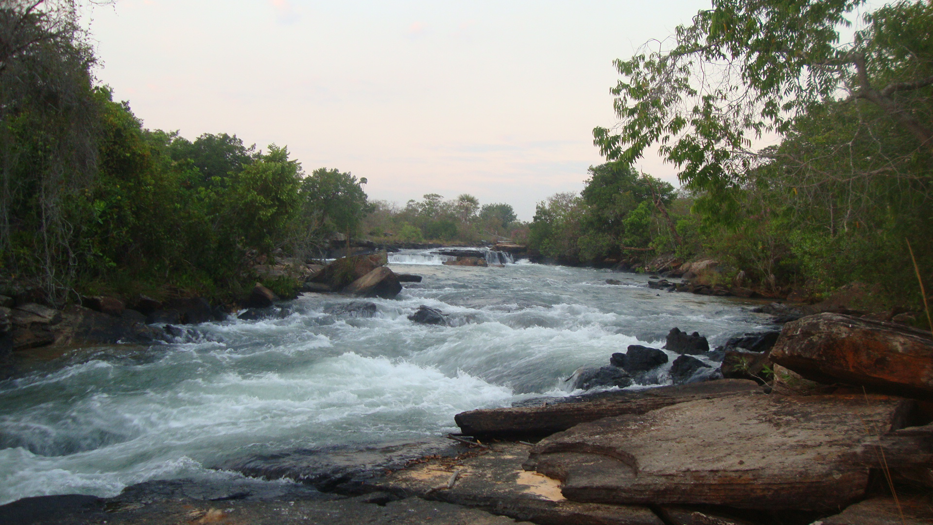 Imagem das cachoeiras das tabocas, localizada no sul do Maranhão. Em alto Parnaíba.